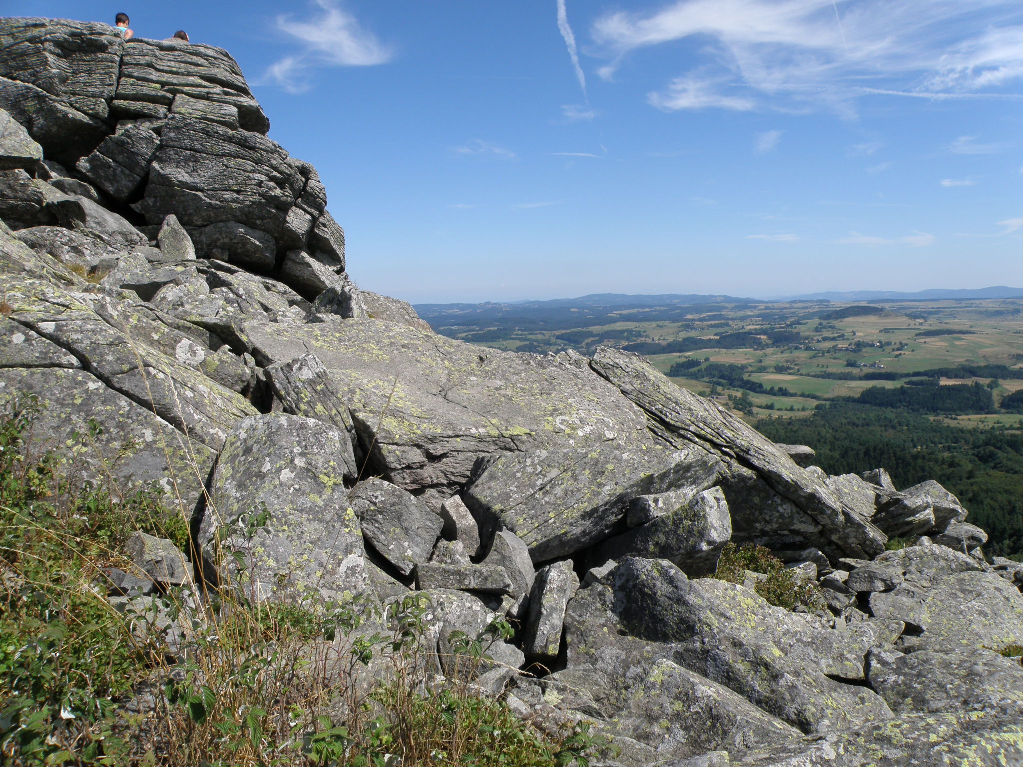 Araules, communes de la Haute-Loire, France, région Auvergne. Pic du Lizieux (appelé aussi suc du Lizieux), 1388 mètres. (Nous regardons vers le sud-est.)